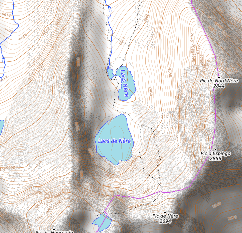 carte réalisée sur umap This map may be incomplete, and may contain errors. Don't rely solely on it for navigation.